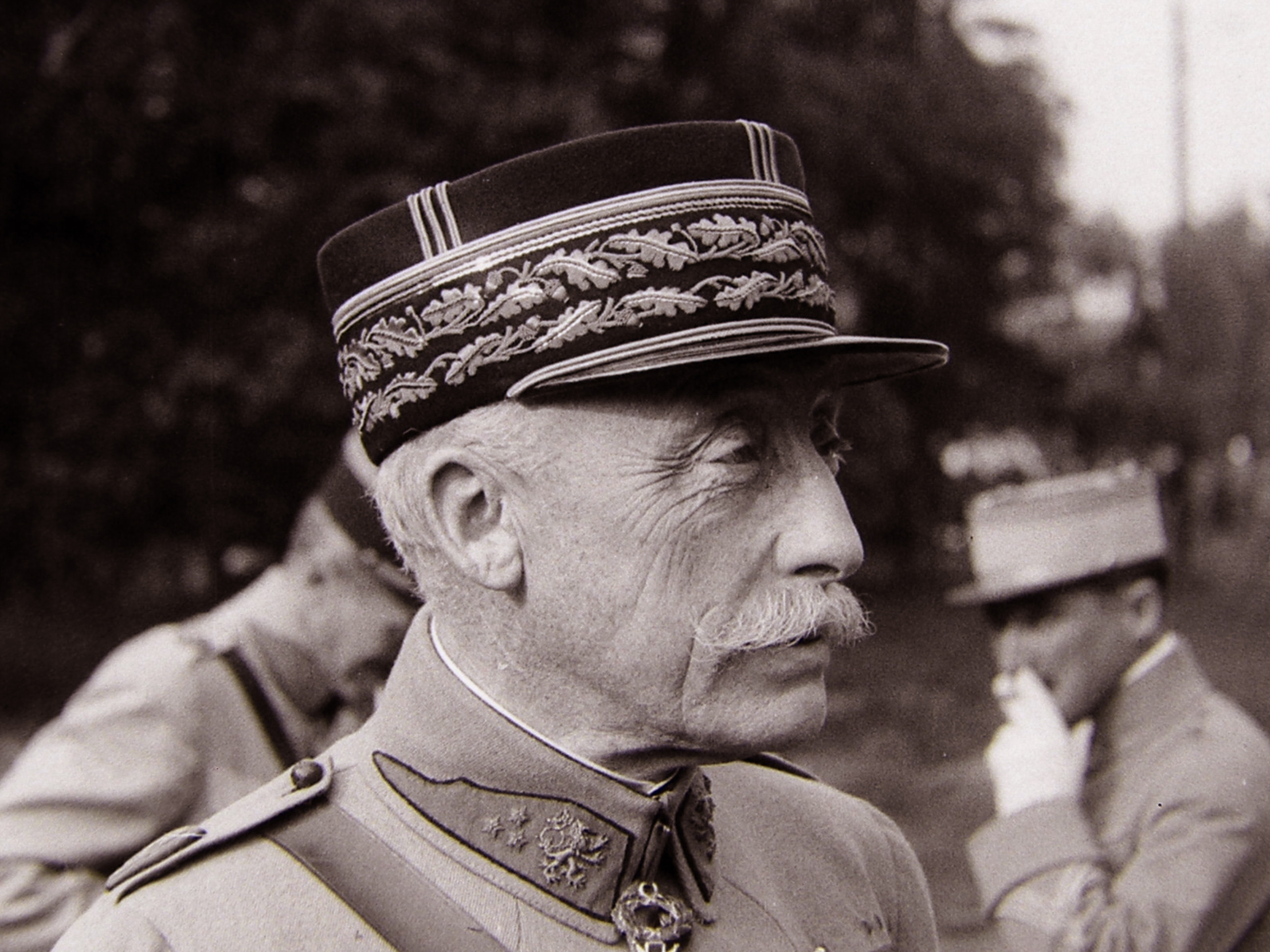 Le général Maurice Pellé, en 1919, chef de la Mission française en Tchéchoslovaquie et chef d'état-major de l'armée Tchéchoslovaque, lion à son revers.